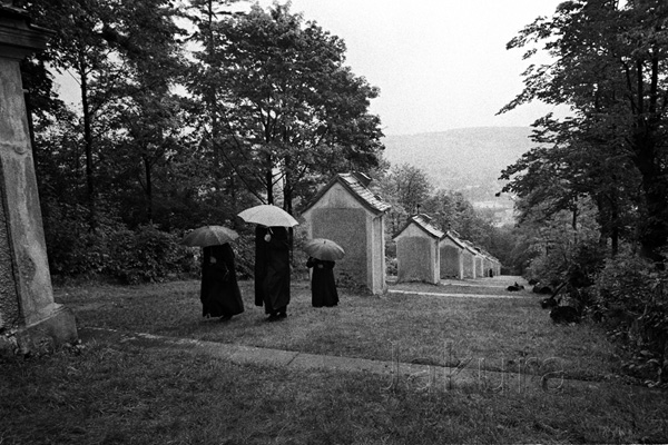 Jiřetín pod Jedlovou, Křížová cesta (1993).